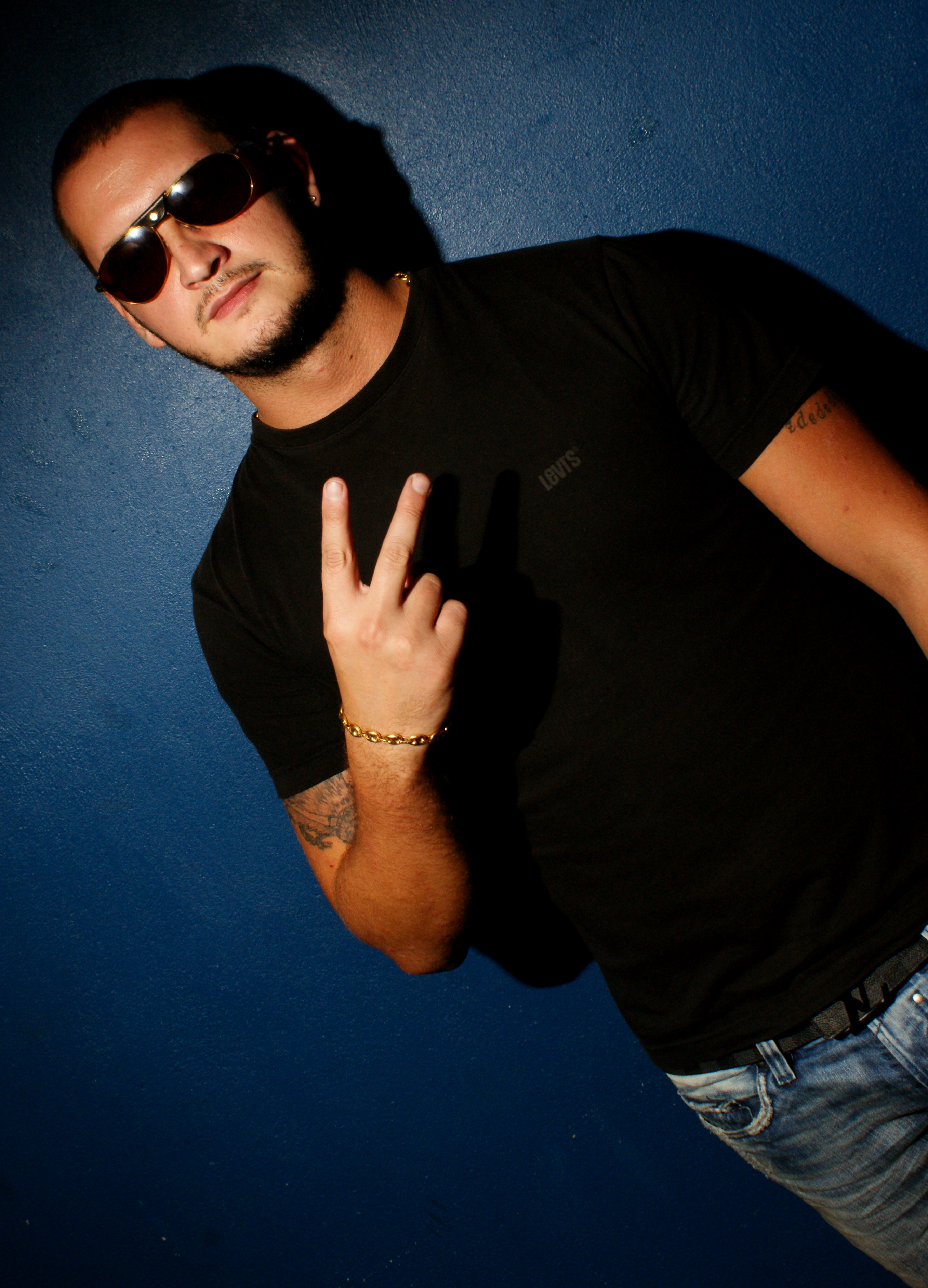 Seth Gueko, festival Arras 2010